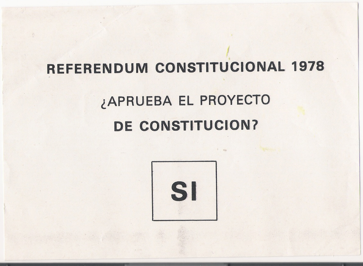 Voto afirmativo en el referéndum constitucional de 1978 en España.